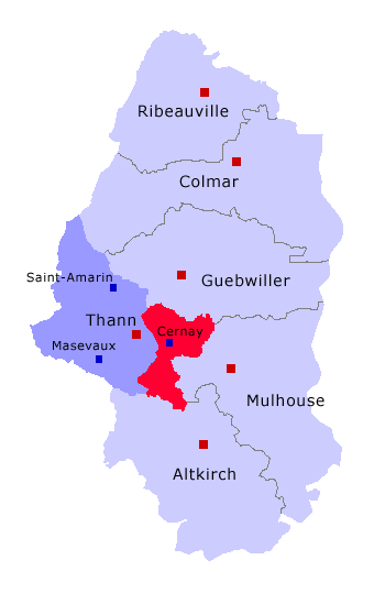 Lage von Kanton Cernay im Arrondissement Thann und im Département Haut-Rhin.